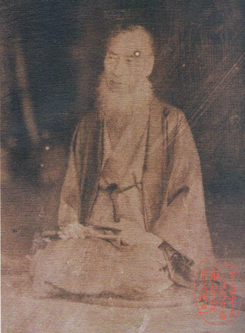 a Japanese painter, 高橋 由一 (Takahashi Yuichi)